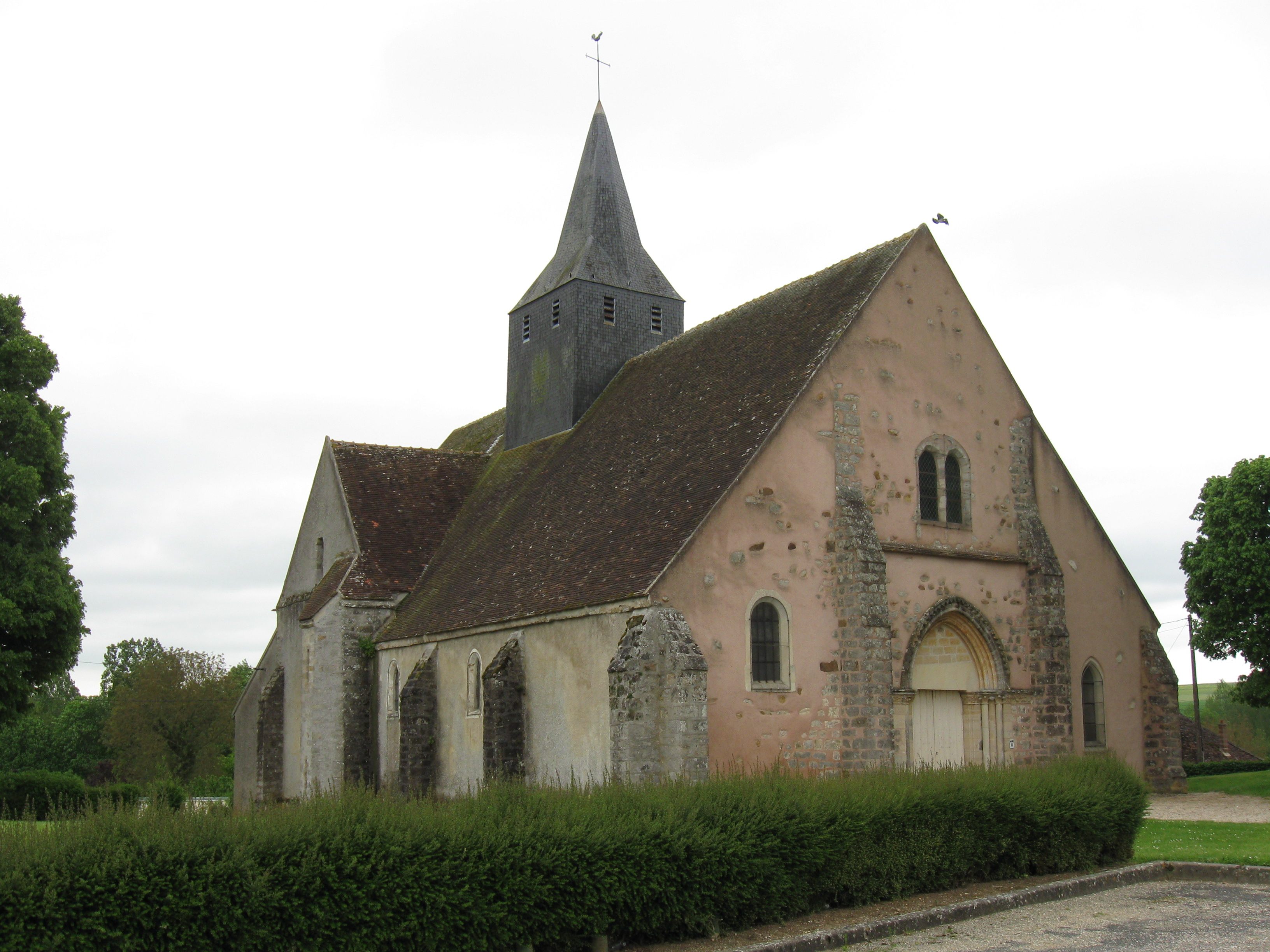 Église Saint-Martin de Fontaine-Fourches. (Seine-et-Marne, région Île-de-France).